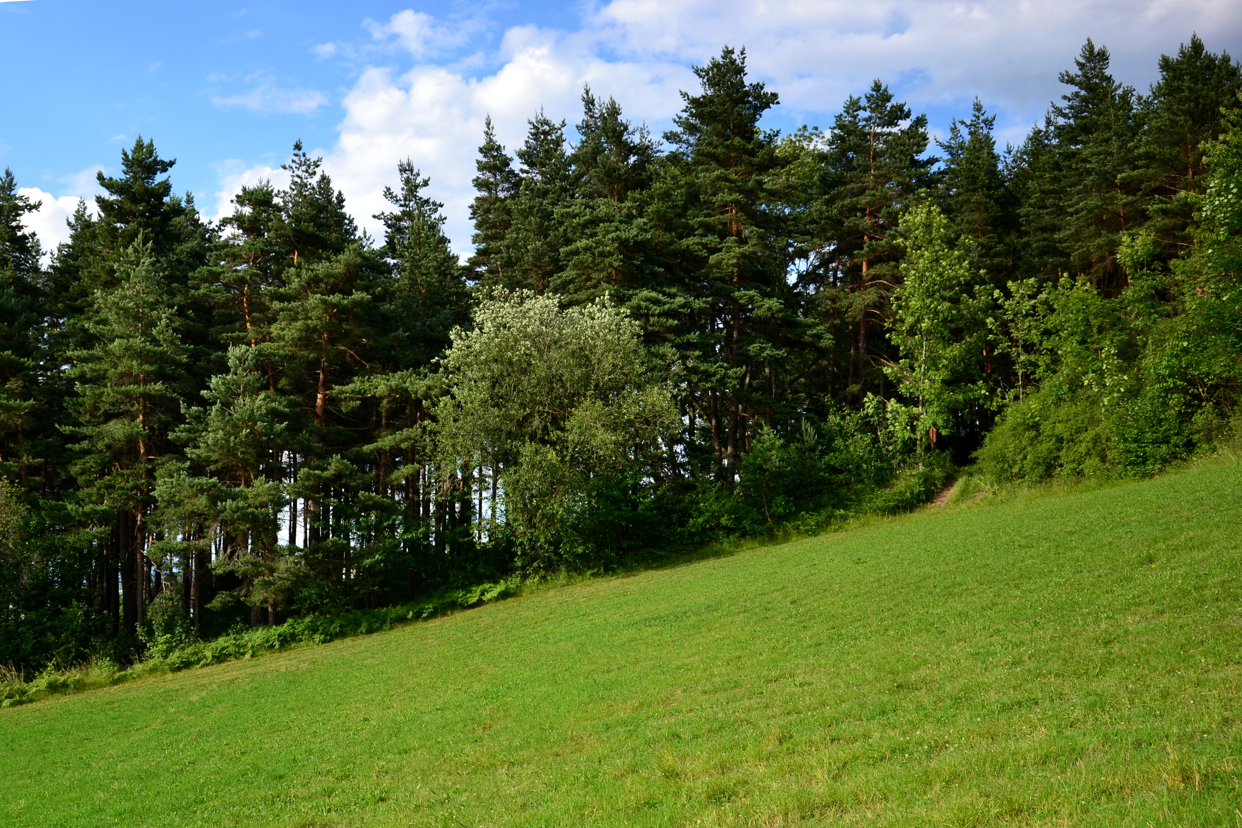 PP Pohorsko